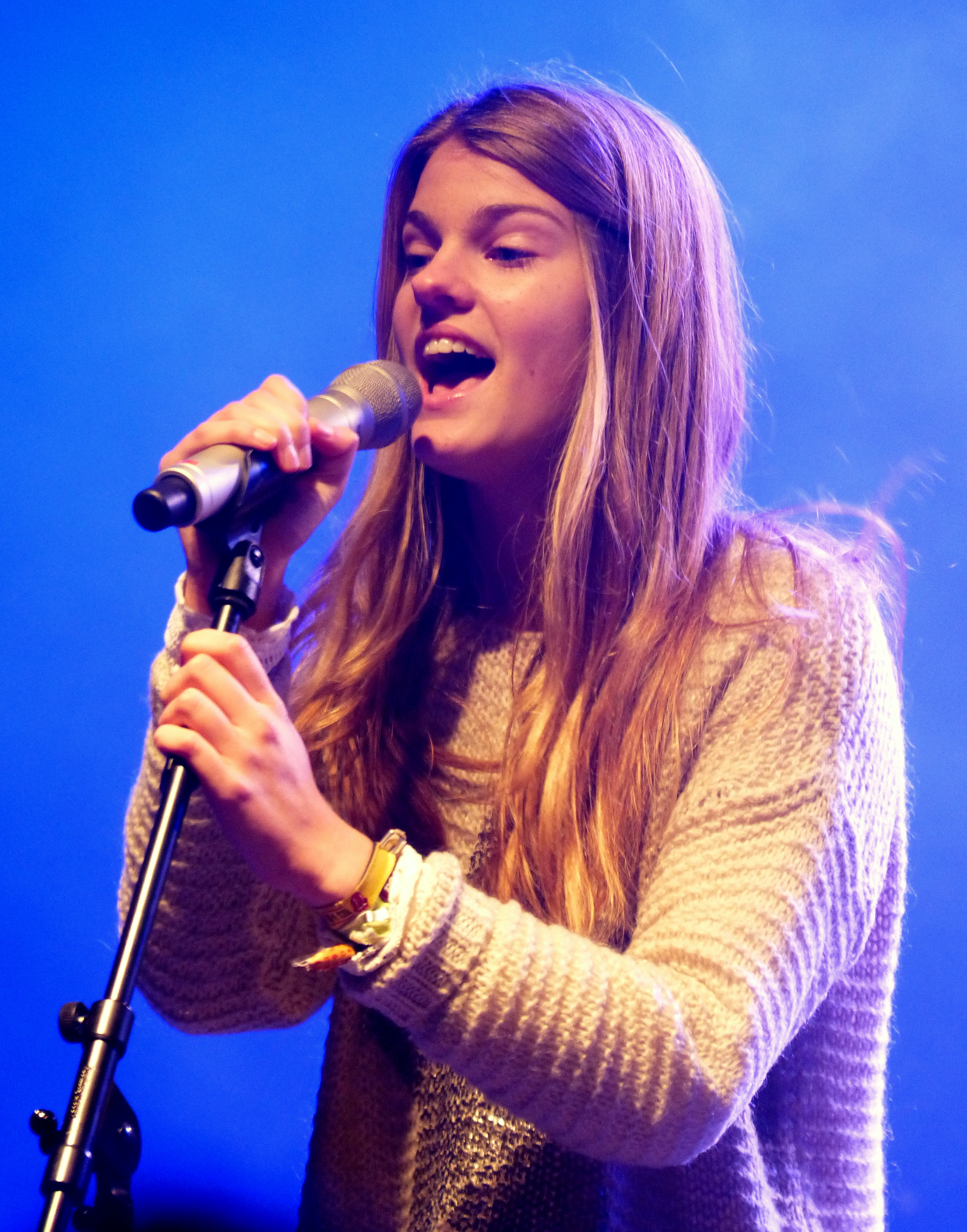 Emma Bale tijdens een optreden op de Lichtstoet op 2de kerstdag, 26 december 2014 in Sint-Katelijne-Waver, haar thuishaven